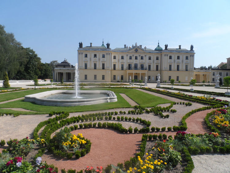 Białystok, pałac Branickich, 2 poł. XVI, 1691-1697, 1720, 1 poł. XIX, 1945-1962